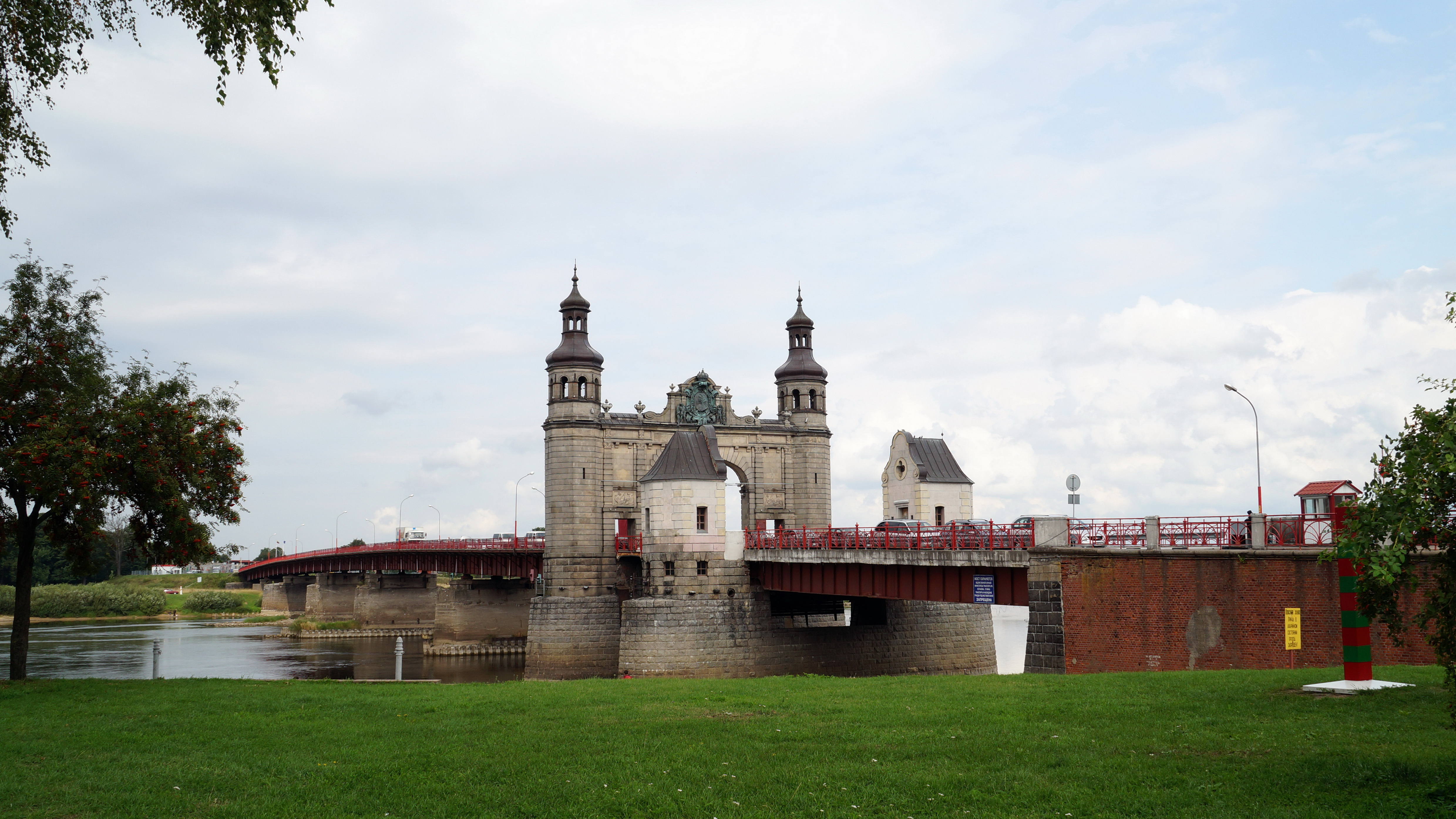 Мост Королева Луиза: Советск, Калининградская область